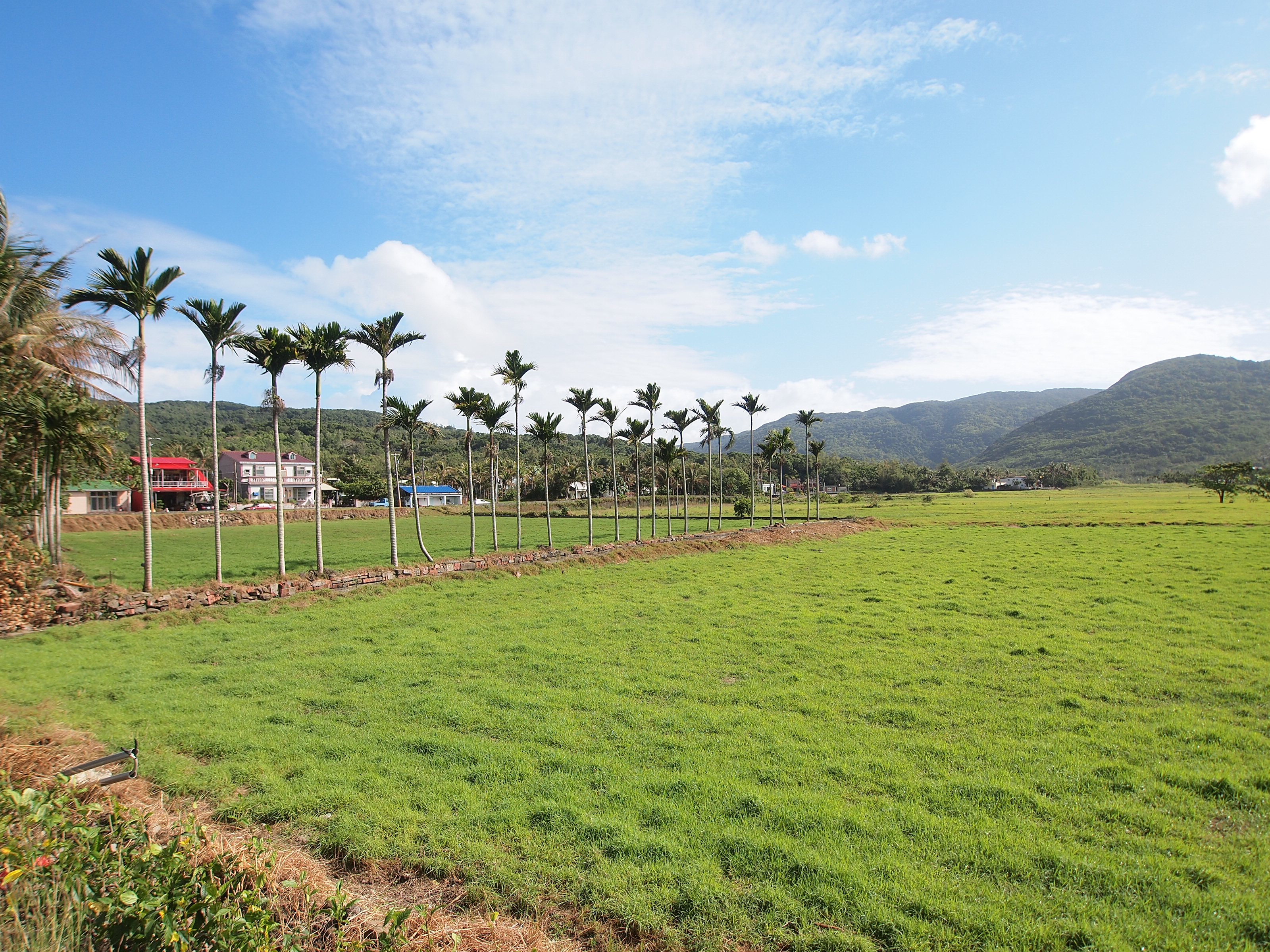 热带风光 - Tropical Scene - 2012.02